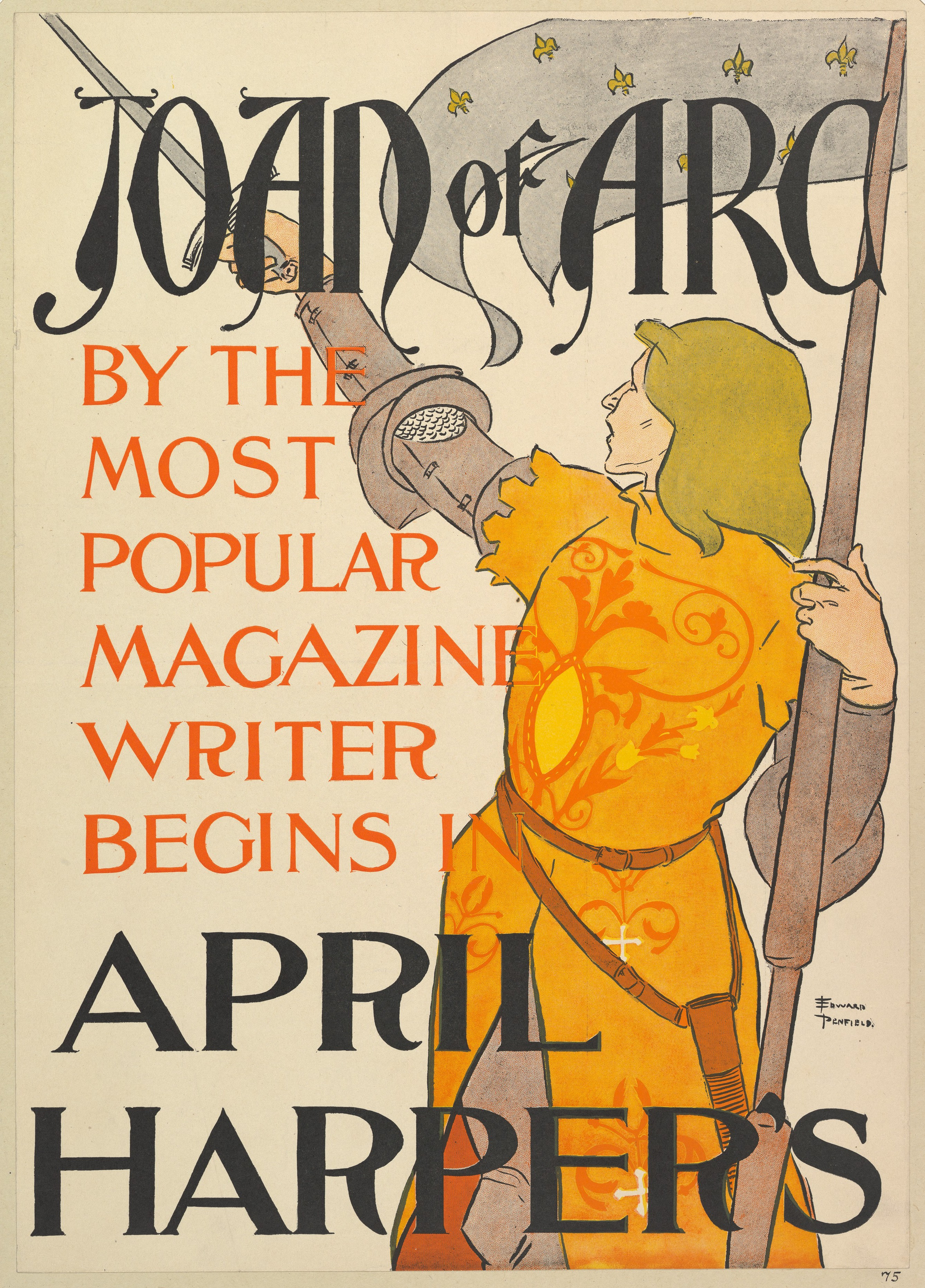 Print; Poster; Prints